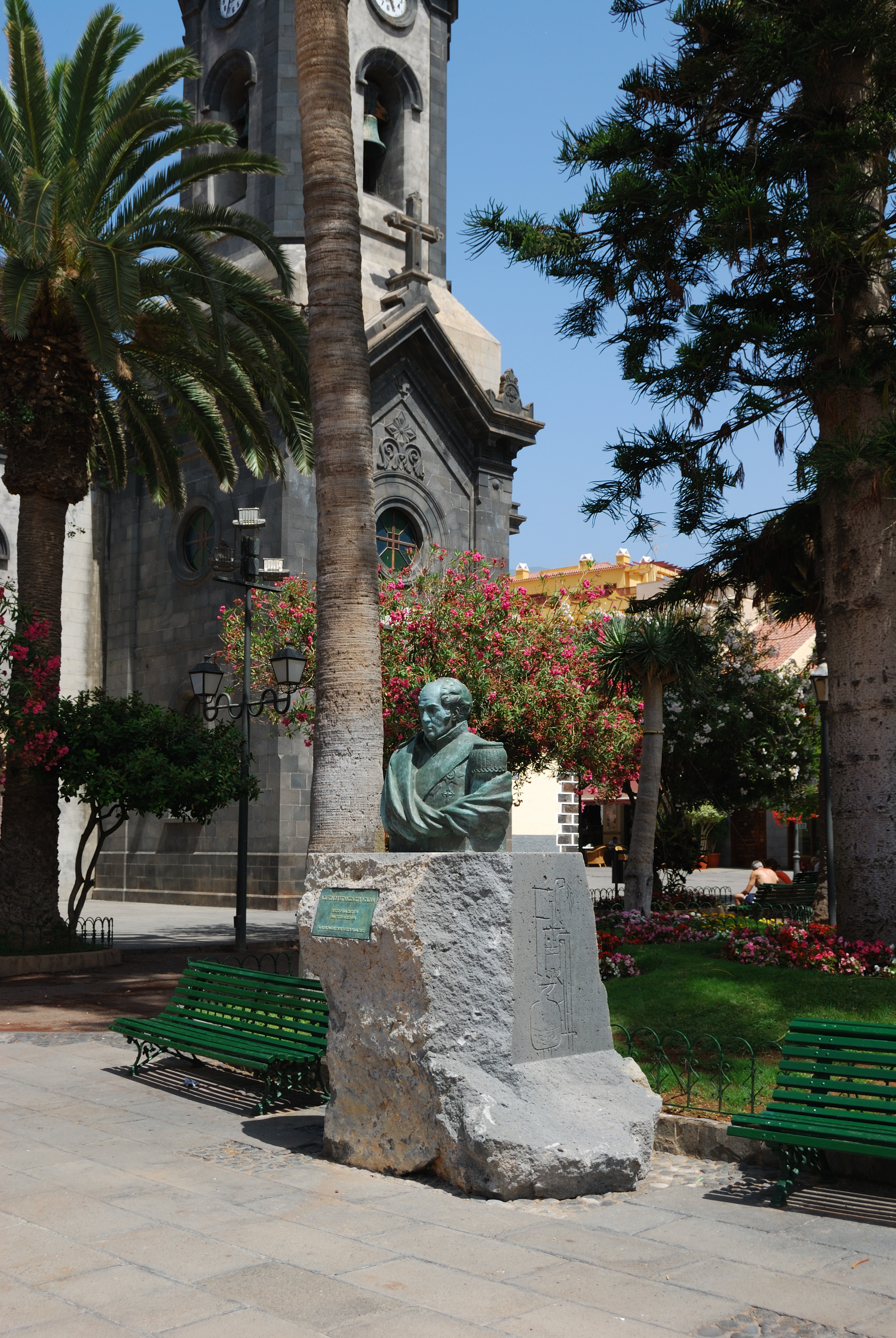 Памятник А. Бетанкуру в Пуэрто-де-Ла-Круз, Тенерифе, Испания